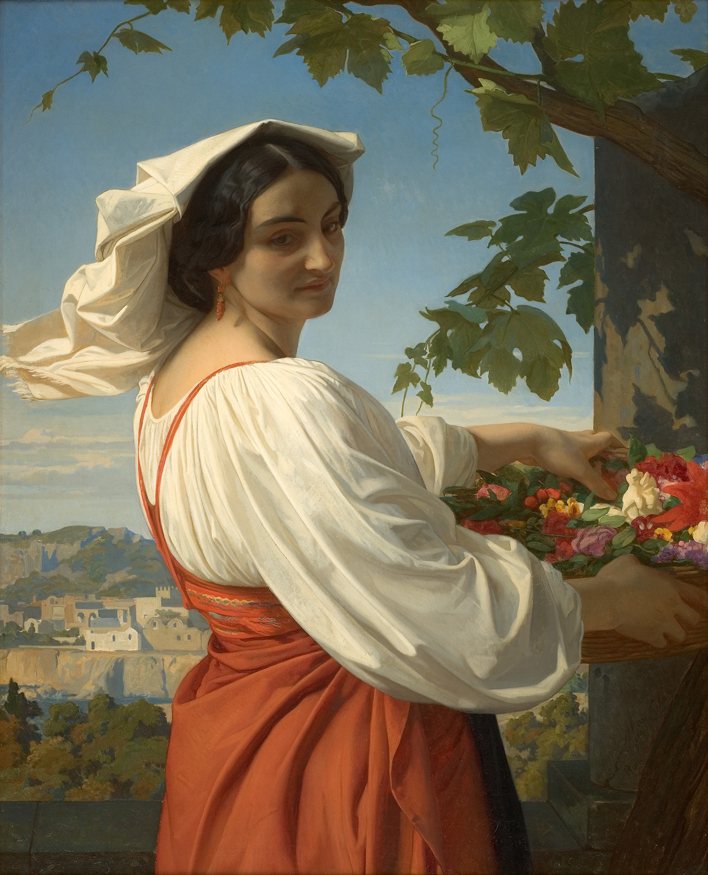 La chiarrucia - Alexandre Cabanel